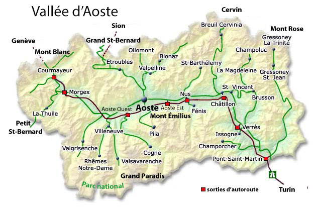 cartevda.jpg